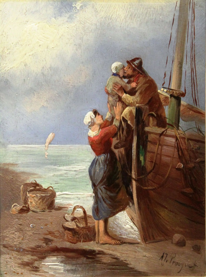 Afscheidskus door A.J. van Prooijen